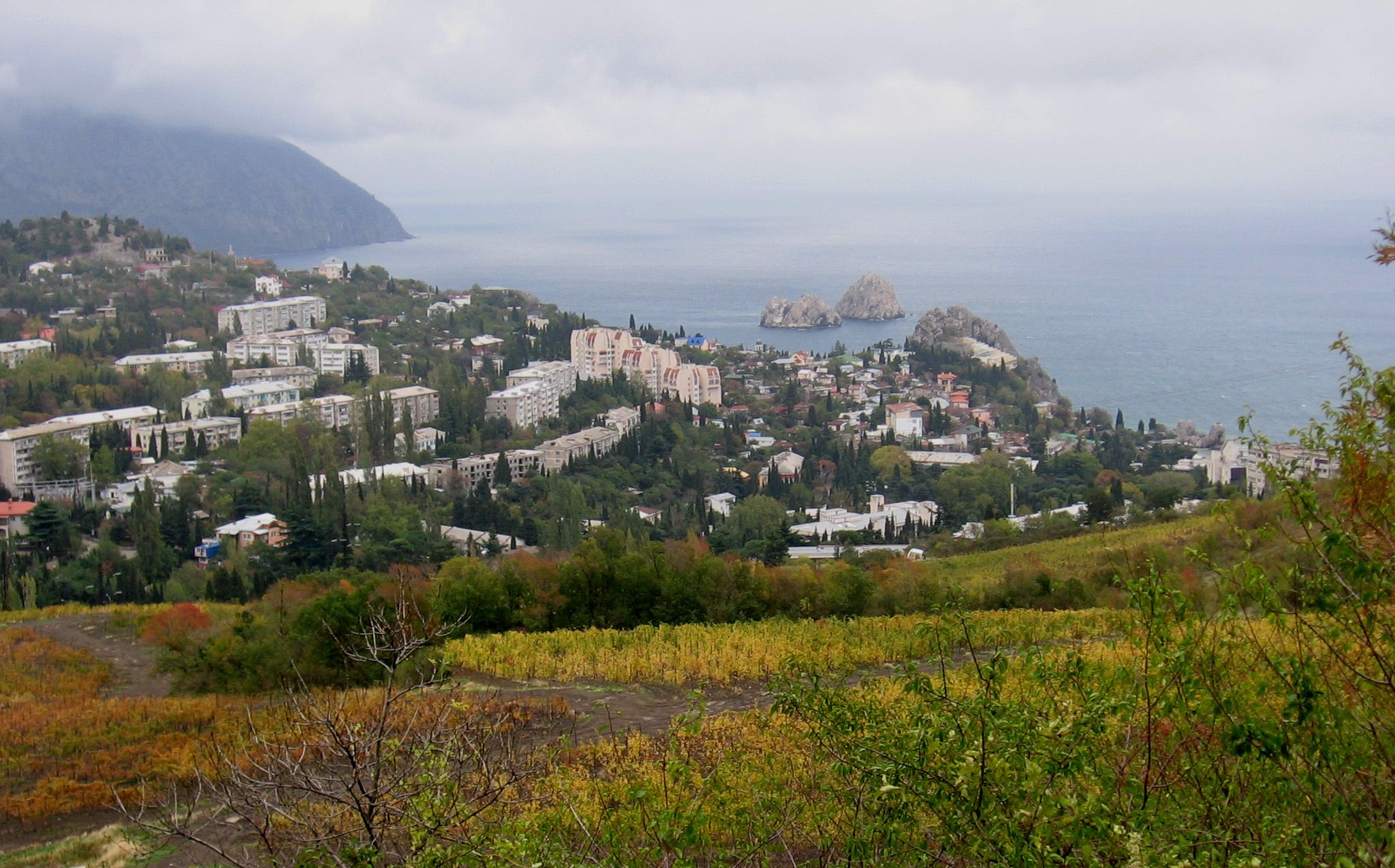 Гурзуф осенью, Крым